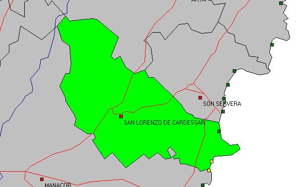 M sanlorenzo Playas